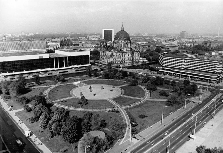 Berlin, Marx-Engels-Forum, Dom, Palast der Republik ADN-ZB Link 27.5.87-cc-Berlin: Reizvoll ist der Blick vom Turm des Roten Rathauses auf das Marx-Engel-Forum im Zentrum Berlins zwischen Spandauer Straße und der Uferpromenade am Palast der Republik. Inmitten einer Kreisfläche von 64 Meter Durchmesser befindet sich das Denkmalensemble. In seinem Zentrum steht die Brozeplastik von Karl Marx und Friedrich Engels in doppelter Lebensgröße. Schöpfer ist der Bildhauer Ludwig Engelhardt. Quer durch den Park ziehen sich rund 10.000 Quadratmeter Haupt- und Nebenwege, die von 56 Laternen zu nächtlicher Zeit erleuchtet werden.